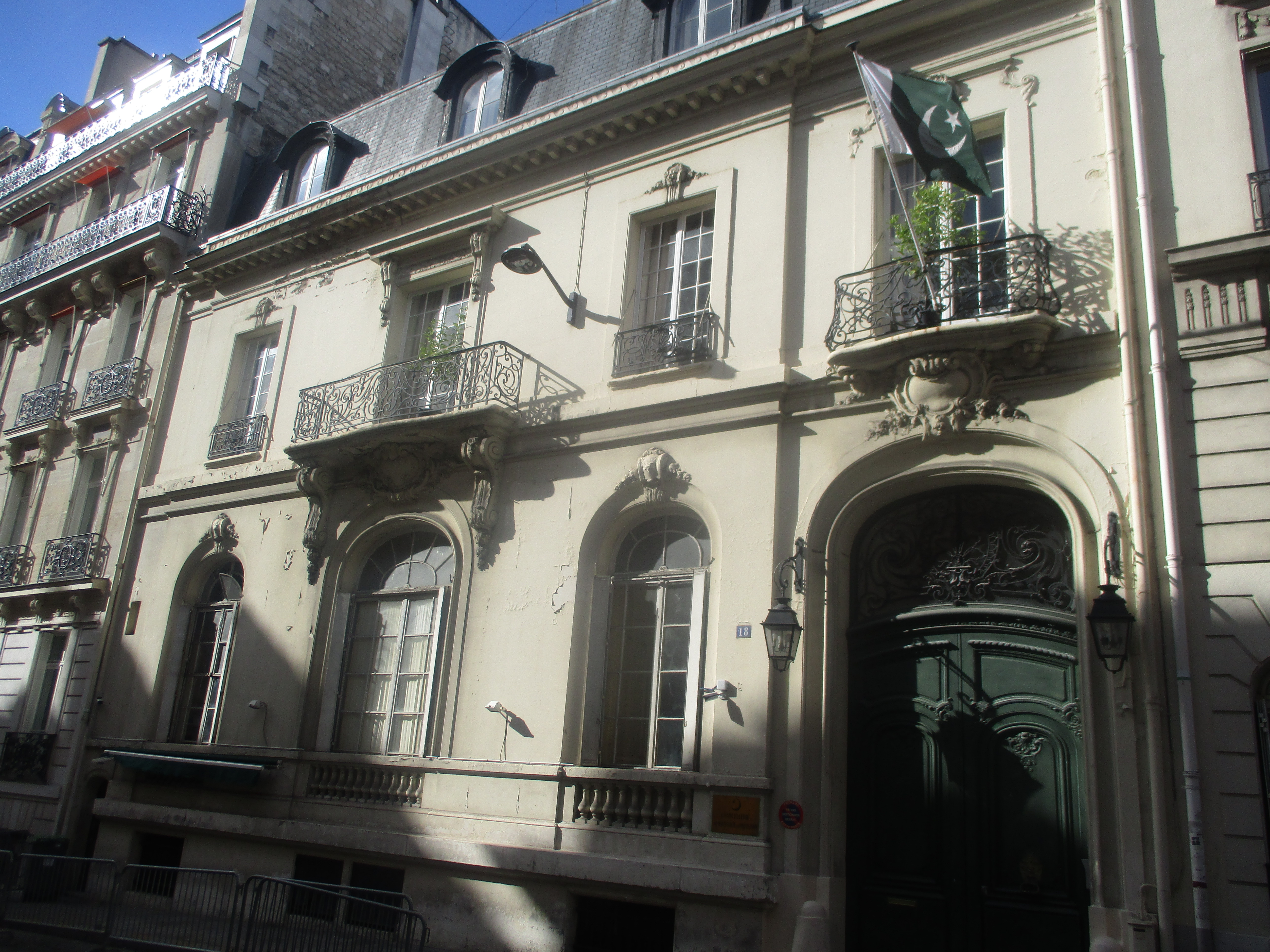 18 rue Byron à Paris, ambassade du Pakistan.